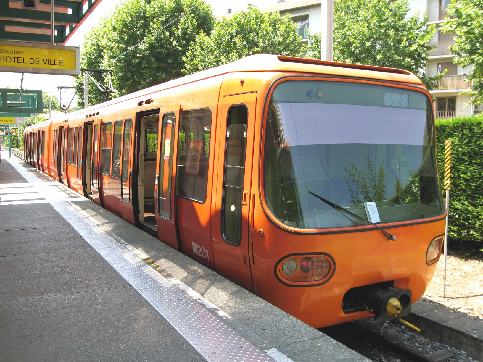 Rame de la ligne C au terminus de Cuire, Lyon, France